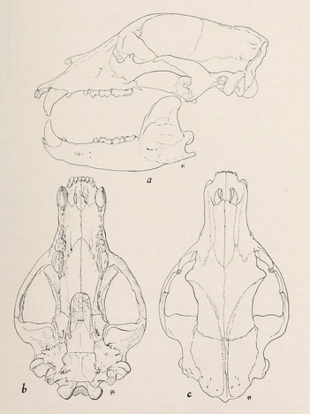 Sketch of black bear skull.